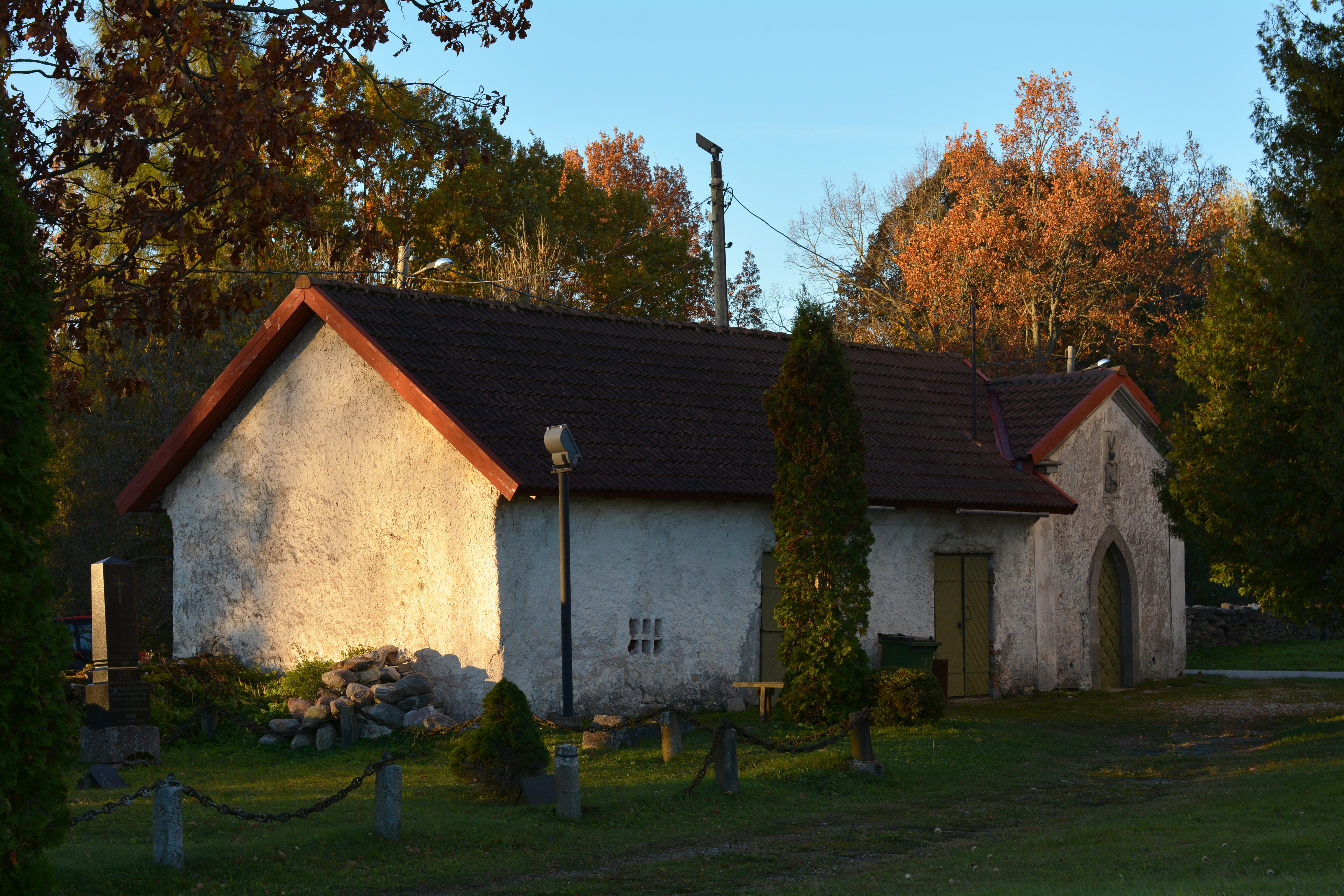 Baranoffide suguvõsa matusekabel pärineb 19. sajandi esimesest poolest. Viimasele on hiljem juurde ehitatud suurem kalmistukabel.